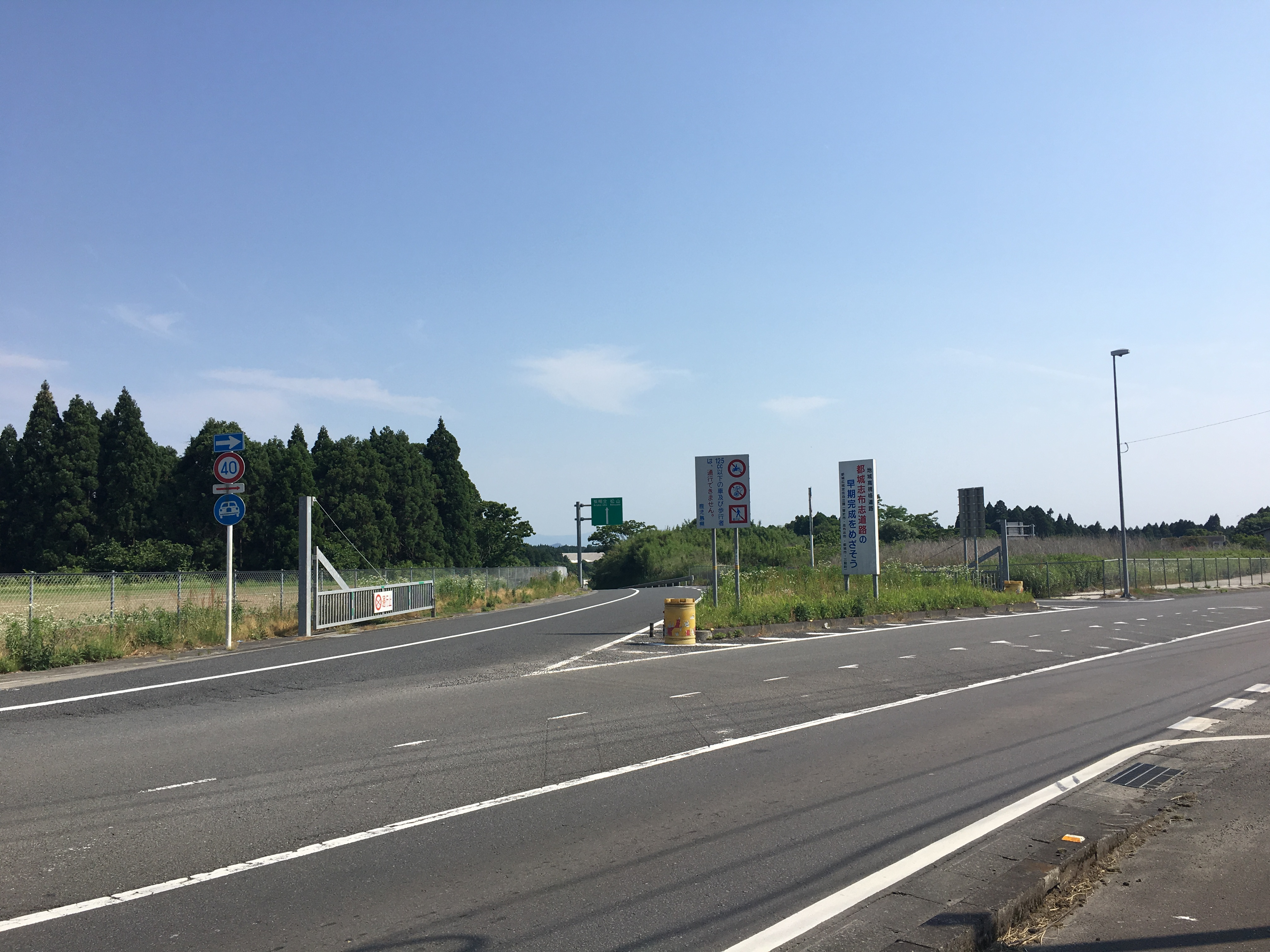 末吉インターチェンジの志布志方面インランプ。